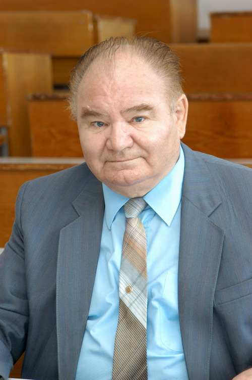 Білуха Микла Тимофійович (професор, доктор економічних наук)